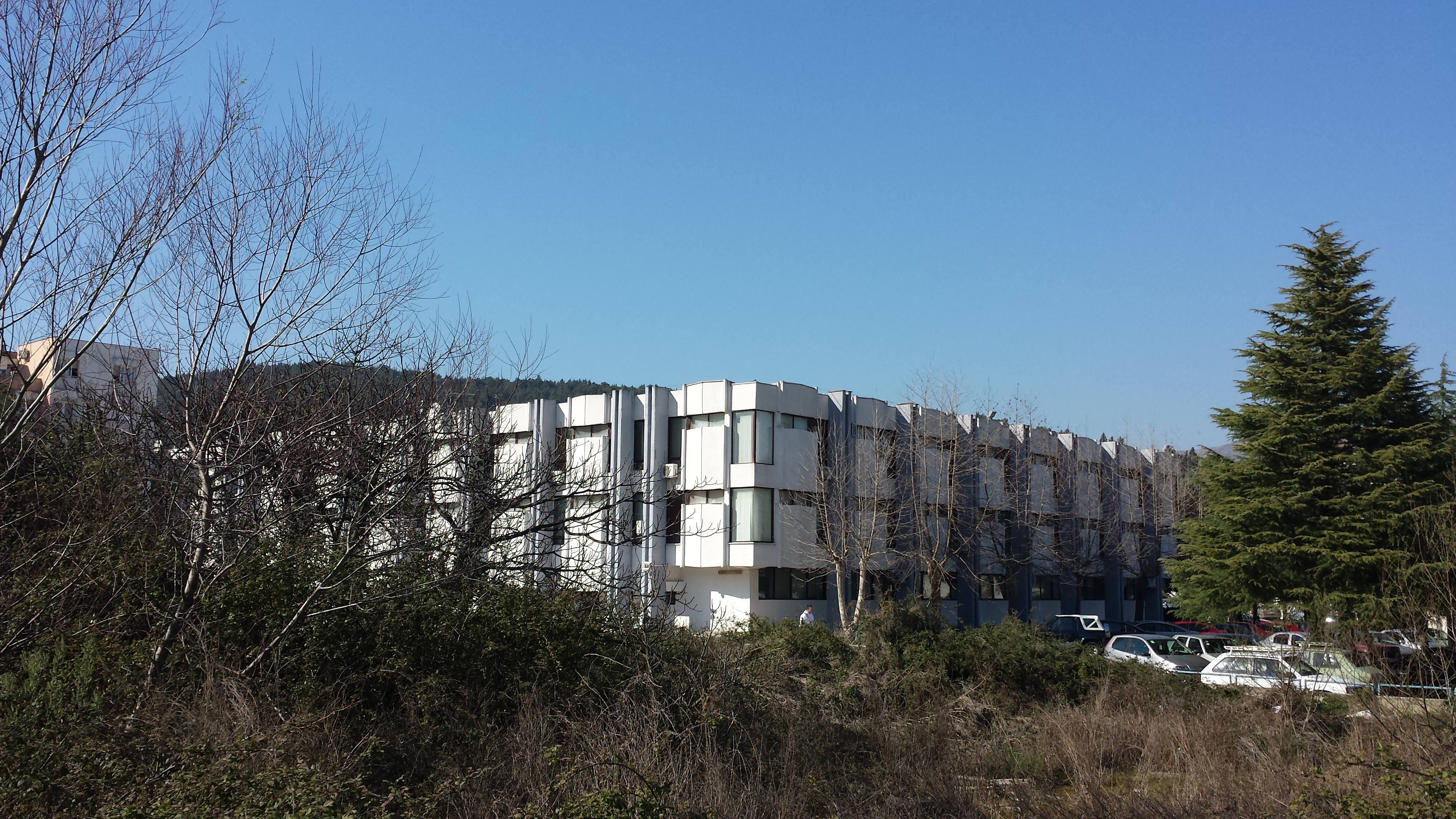 Ndërtesa e Kuvendit të Komunës së Ulqinit.